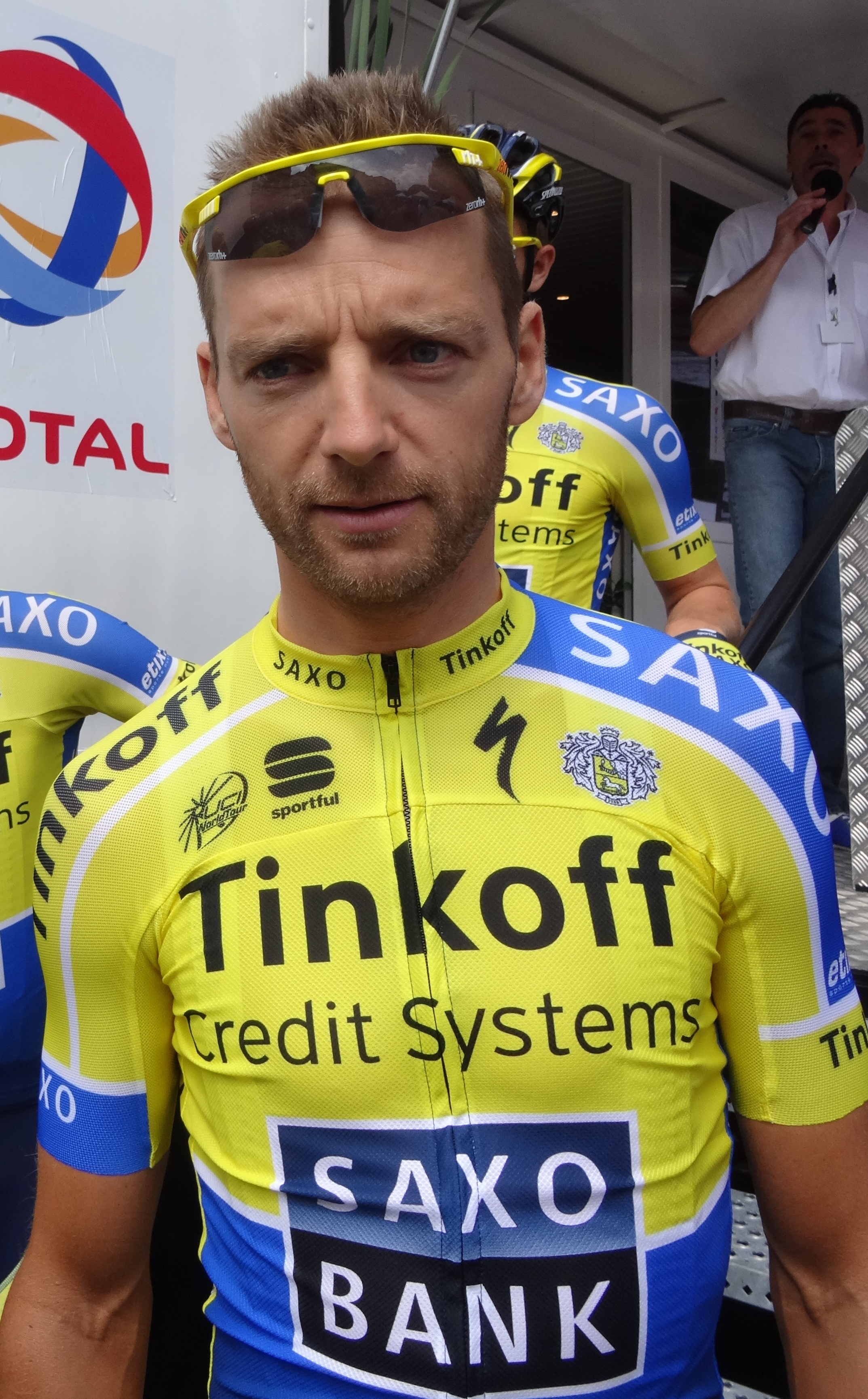 Reportage photographique réalisé le samedi 26 juillet à l'occasion du départ de la première étape du Tour de Wallonie 2014 à Frasnes-lez-Anvaing, Belgique.